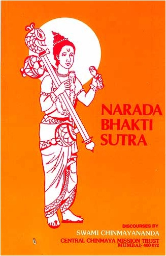 Обложка книги. Собственноручный скан.